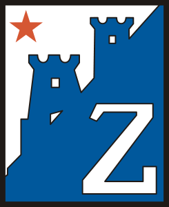 Pravedna upotreba za sliku NKZagreb_do90.svg: ~Slika je tu da ilustrira članak NK_Zagreb ~Slika je najvjerojatnije zaštićena autorskim pravom, ali se na wikipediji rabi pod uvjetima pravedne upotrebe ~Slika se koristi jer nema odgovarajuće slike u javnom vlasništvu koja bi mogla poslužiti ~Uporaba slike:Minimalna (1 članak) ~ Slika je niske rezolucije